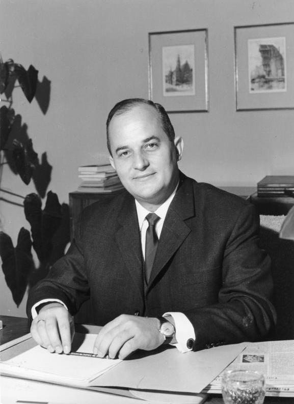 Bundesminister Dr. Rainer Barzel (Porträt) Aufnahme: 28.12.1962